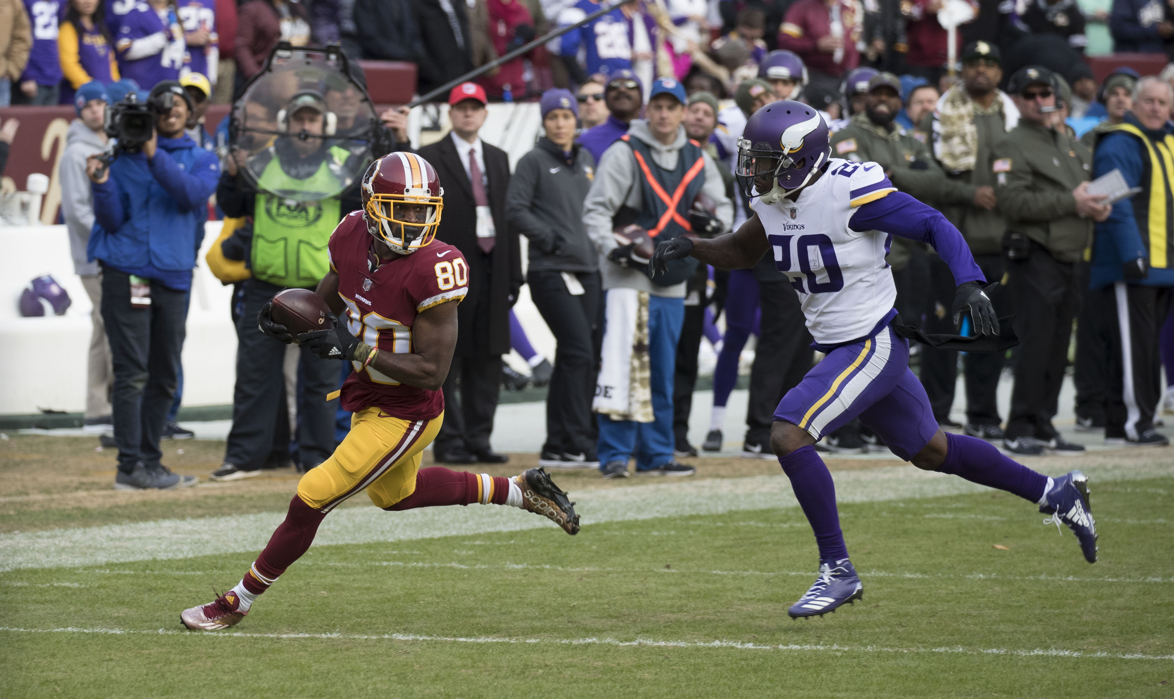 Vikings at Redskins 11/12/17